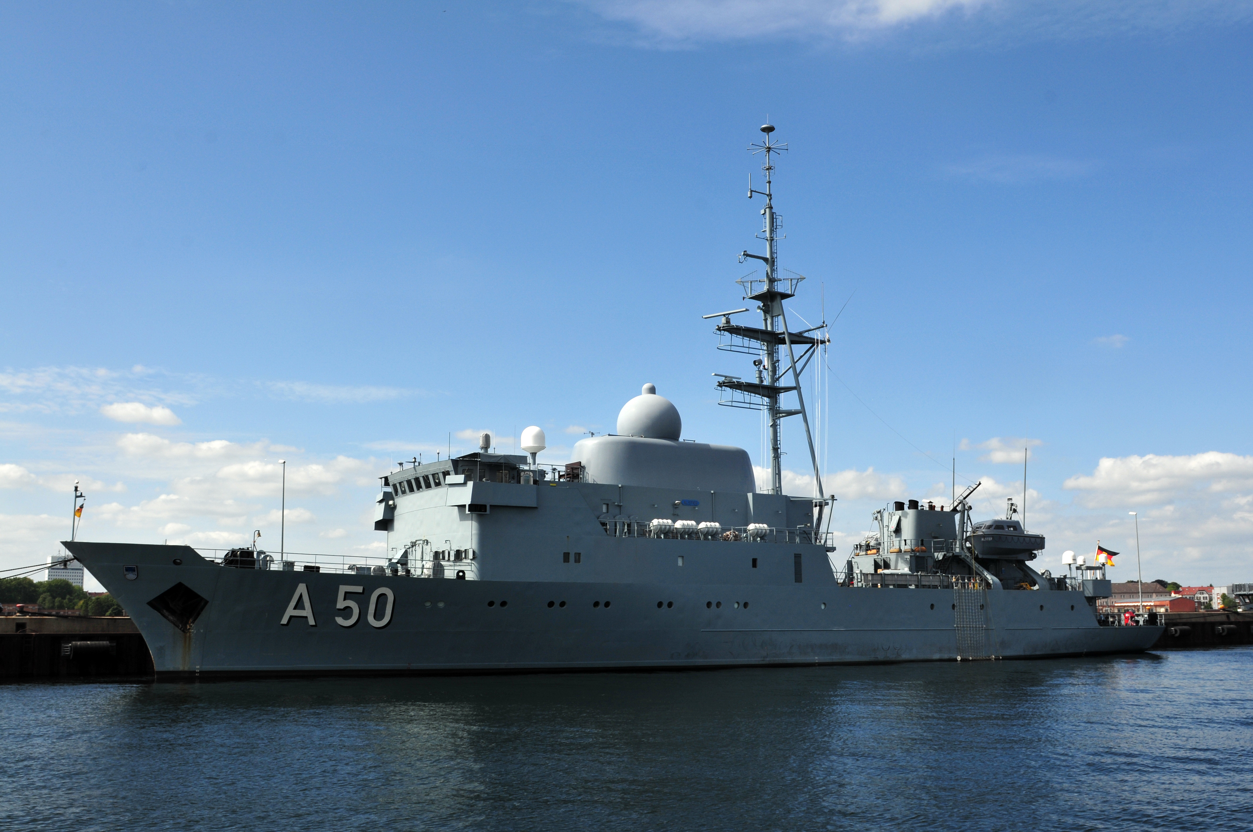 Landtagsprojekt Schleswig-Holstein; Marinestützpunktkommando Kiel